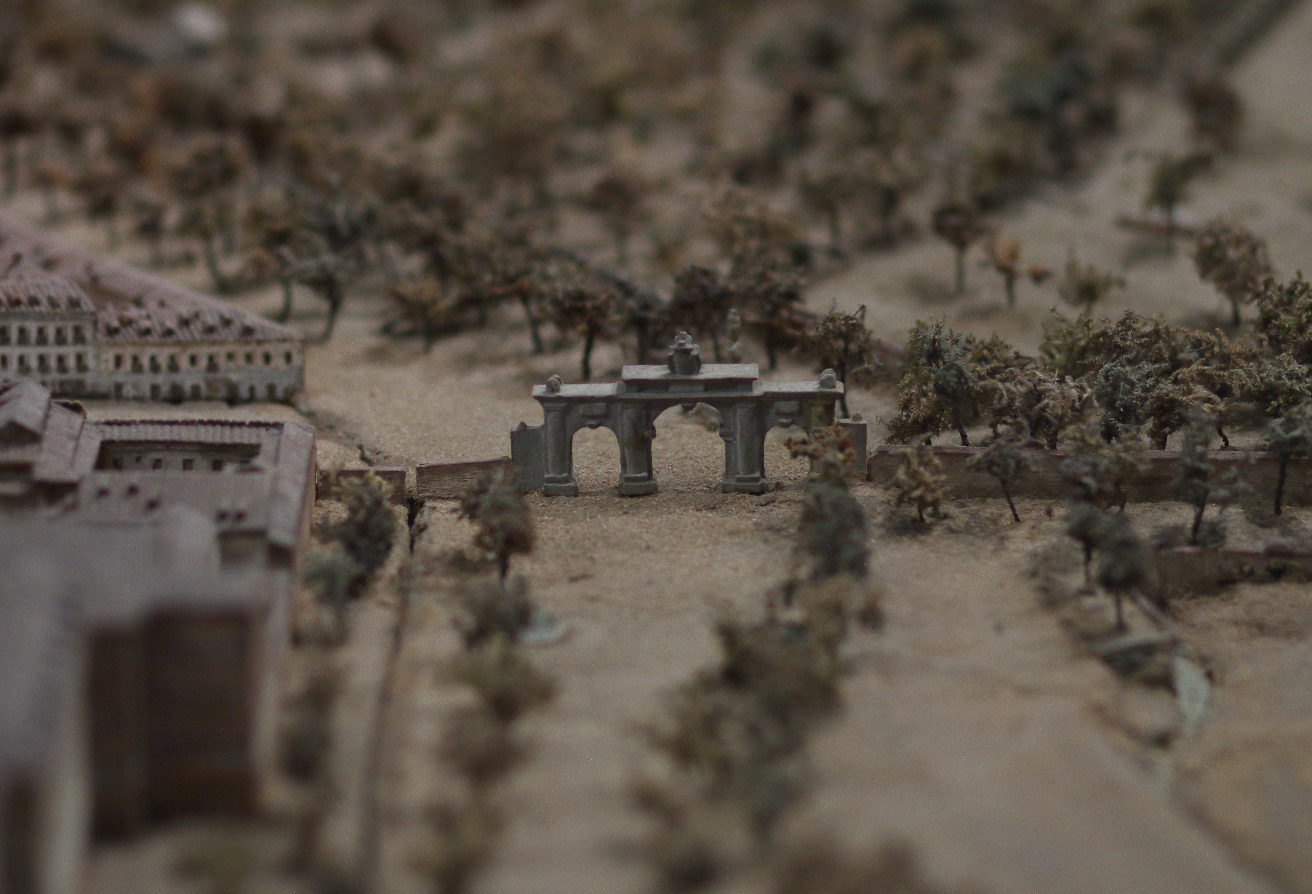 Representación de la Puerta de Atocha en la Maqueta Histórica de Madrid de 1830 realizada por León Gil de Palacio, Museo de Historia de Madrid, Ayuntamiento de Madrid.